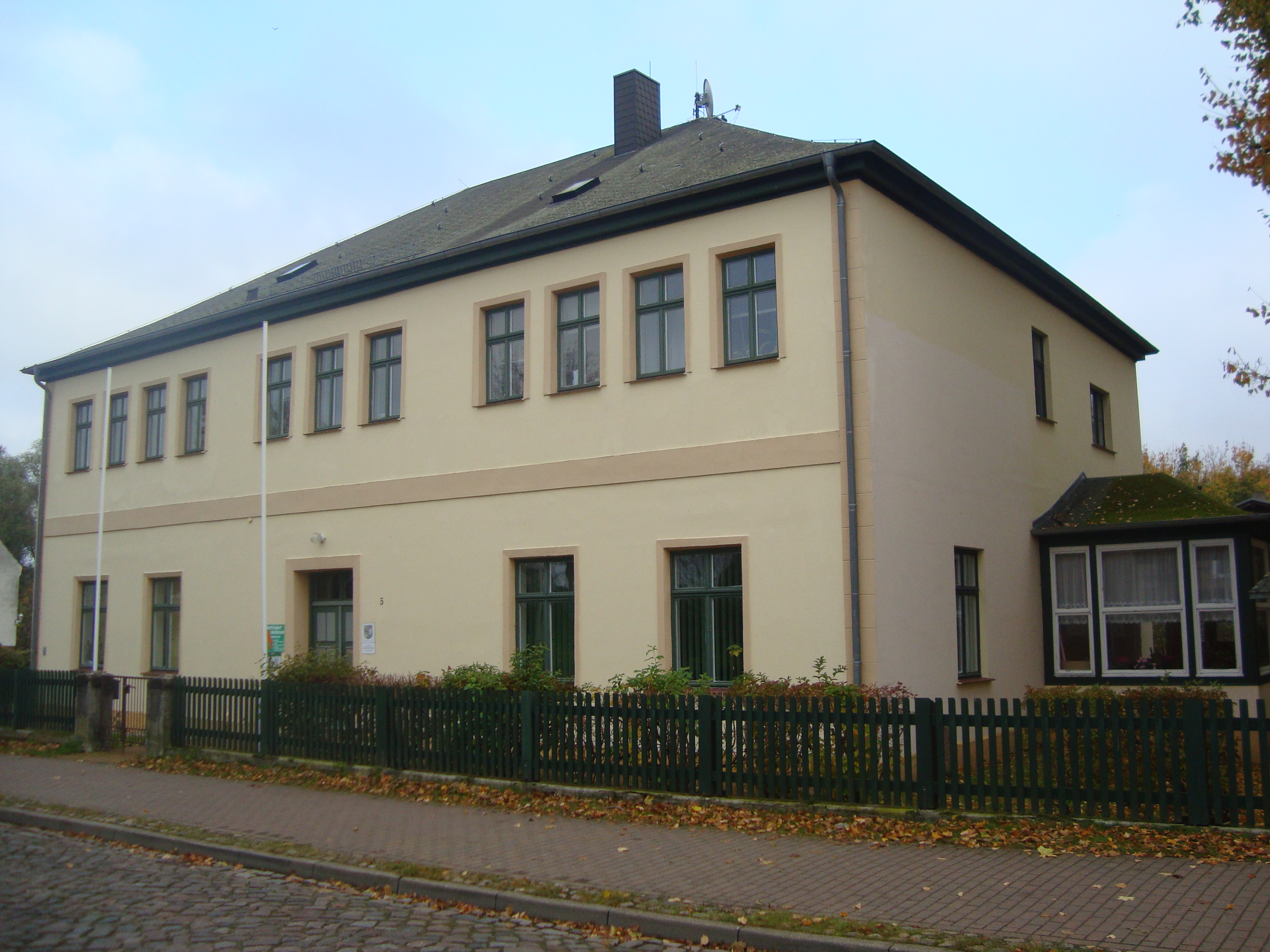 Forstamt in der Hainstraße 5 im Ortsteil Eldena in Greifswald.